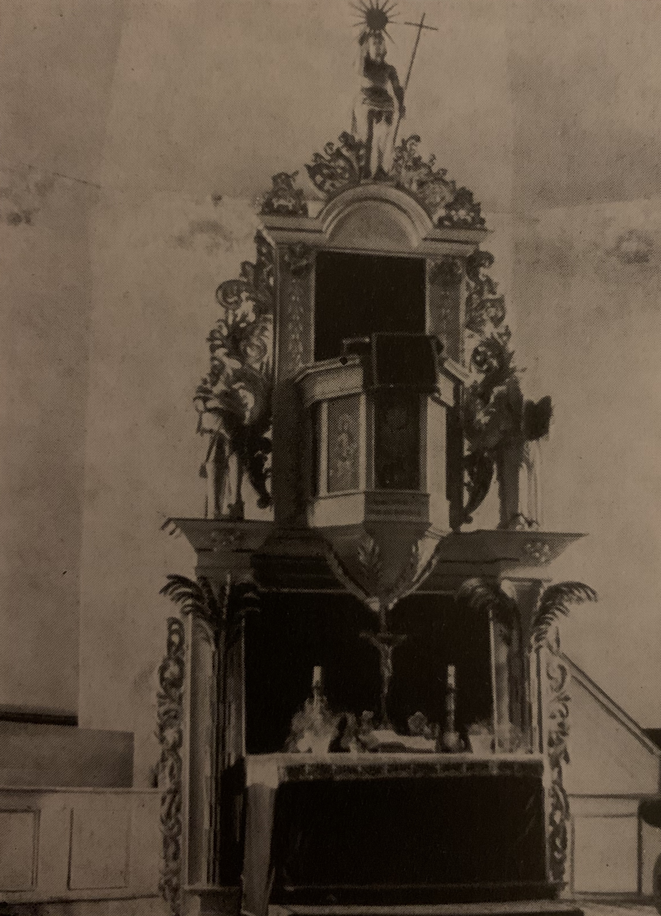 Ehemaliger Kanzelaltar der Dorfkirche St. Trinitatis in Wolkramshausen. Holzaufbau von 1715, bei letzter Sanierung in 1990er Jahren entfernt.